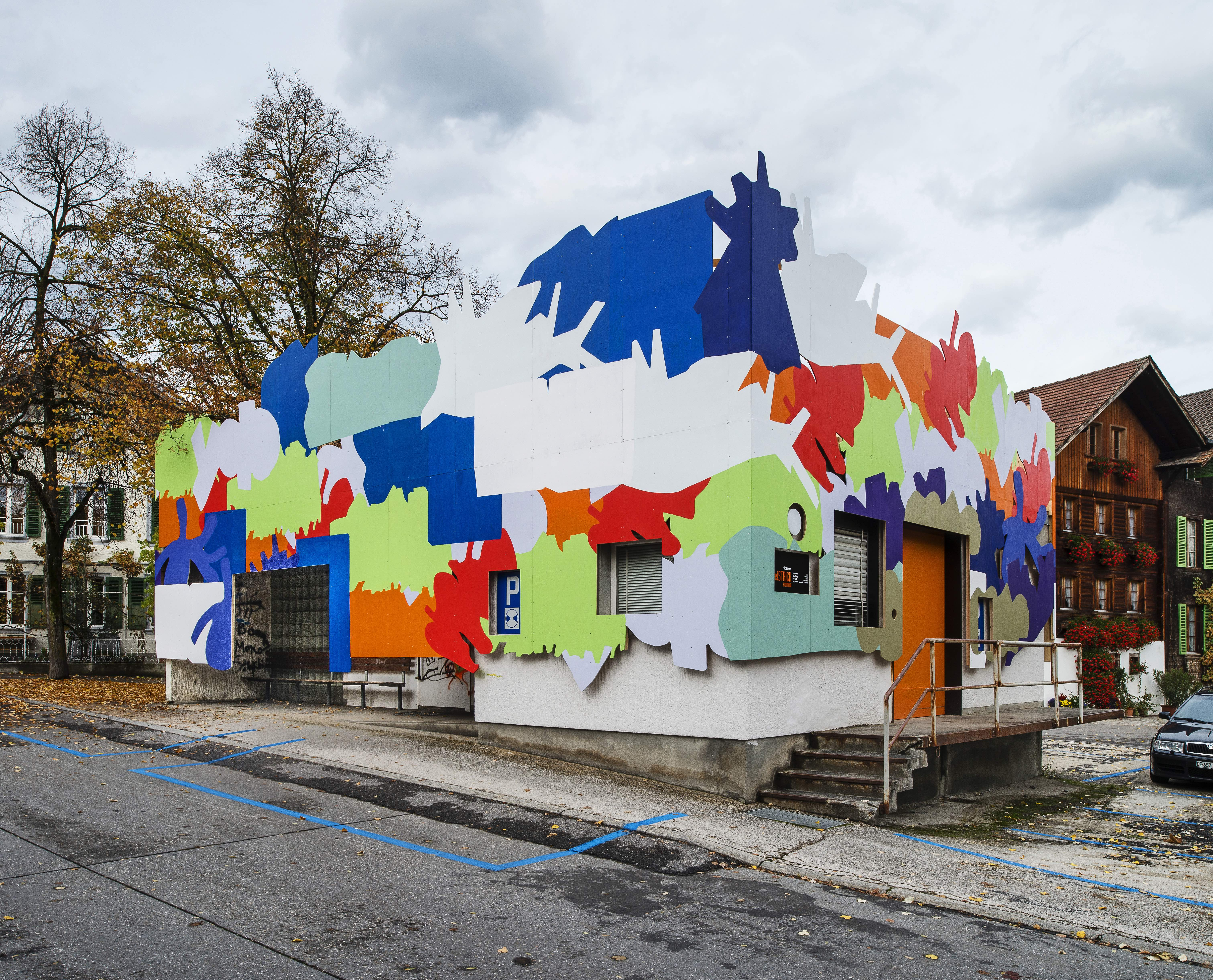 Hanswalter Graf, Kunsthaus Steffisburg, 2014